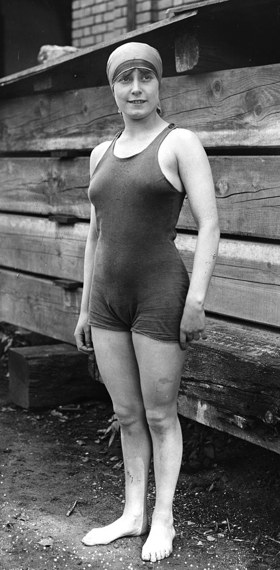 Suzanne Wurtz - [1-8-20, championnat de France de natation, bassin de la maison Niclausse à la Villette], S[uzanne] Wurtz]